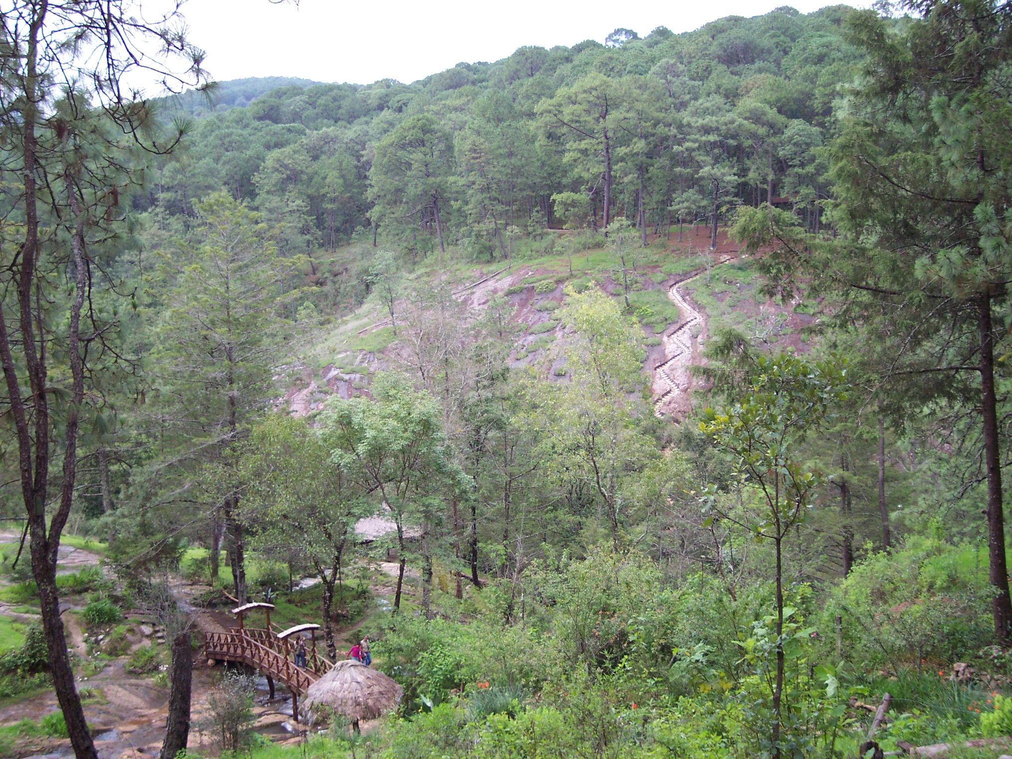 Paisaje de Mazamitla